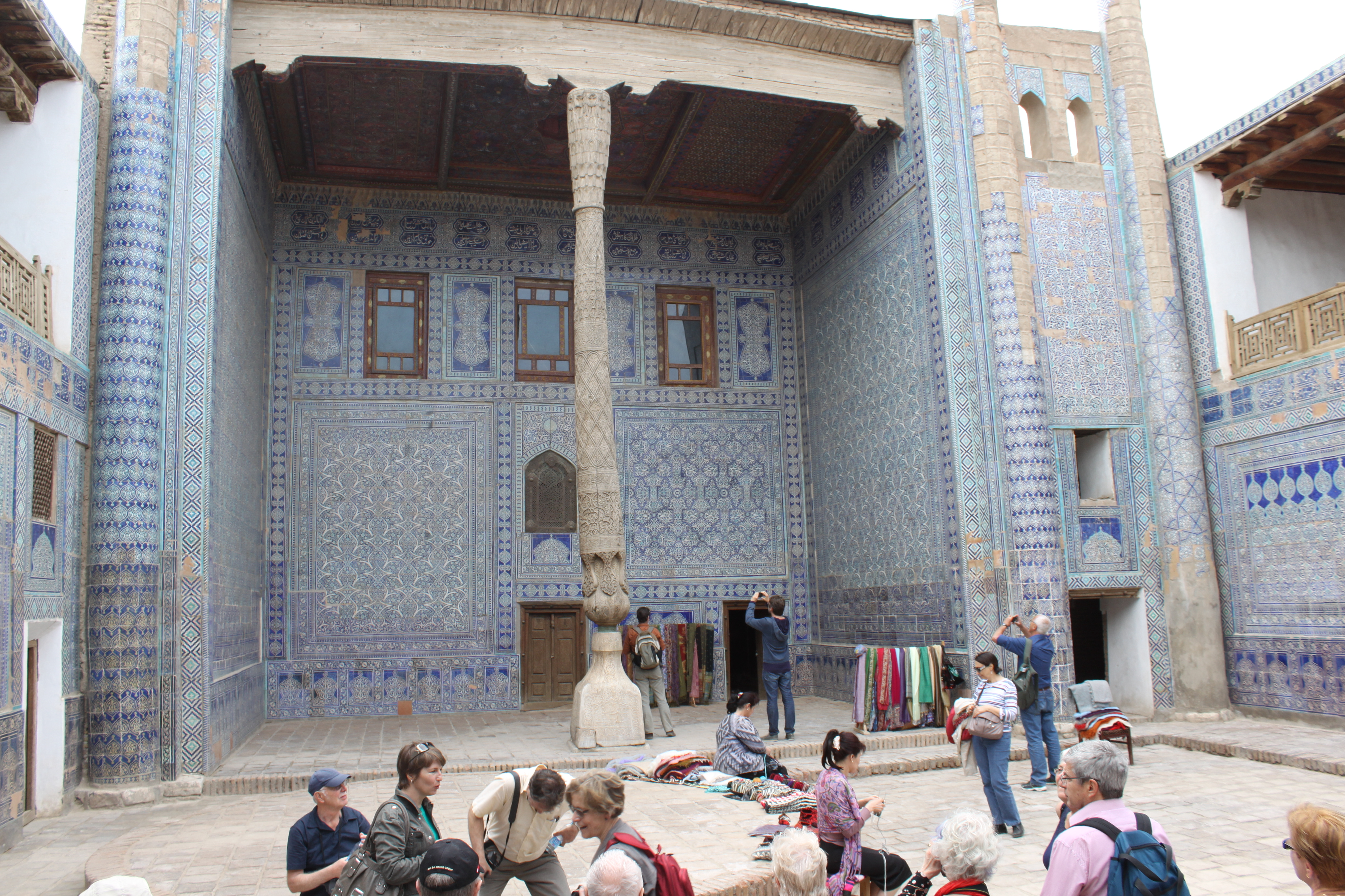 Iwan de la cour de réception de tach khaouli